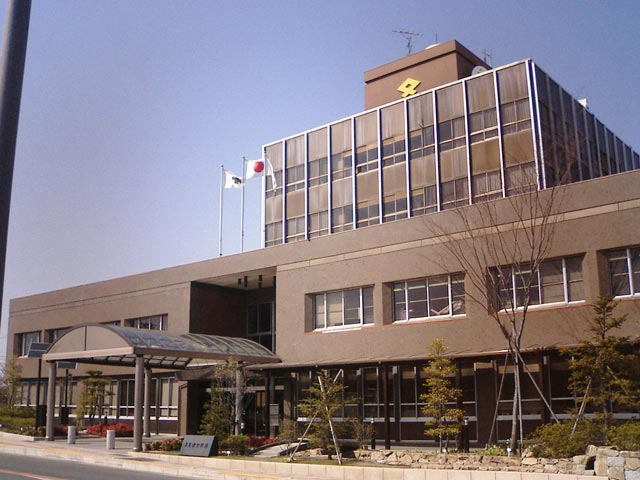 多度津町の役場 - 日本国香川県仲多度郡多度津町。